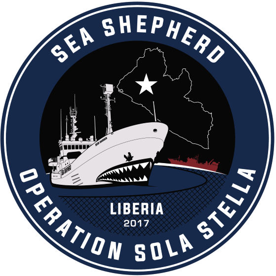 Le logo de l'opération